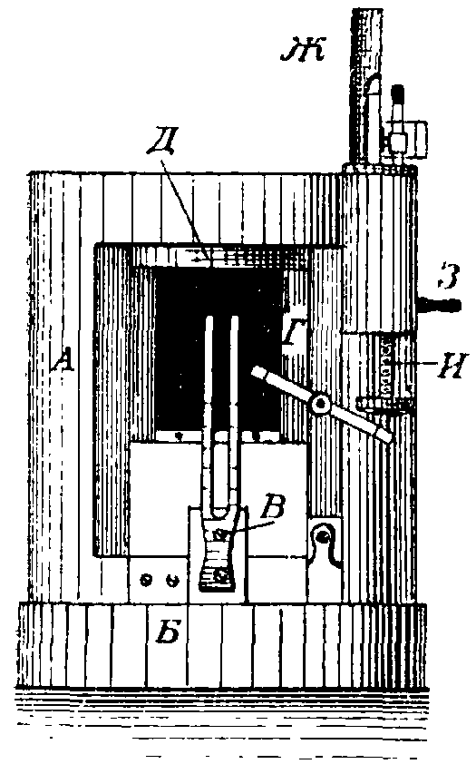 Фиг. 1. Акселерограф Марселя Депре.